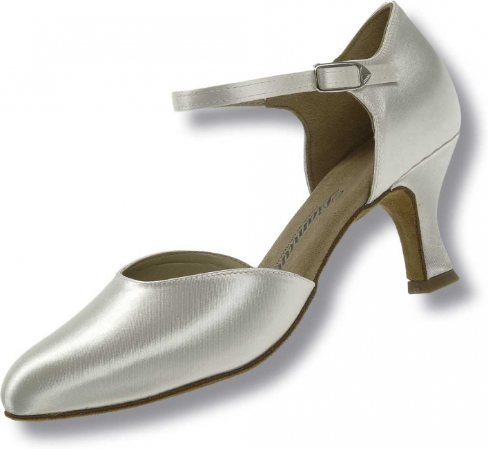 ArtNr. 069-106-092 Mod. 069 Damenschuh Weite E½ Normalweite Flare Absatz 5 cm weiß Satin